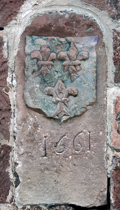 Borne datée de 1661, placée en face de l'église du village de Garrebourg, indiquant qu'un quart du village appartient au roi de France, pour le passage de la route de France.